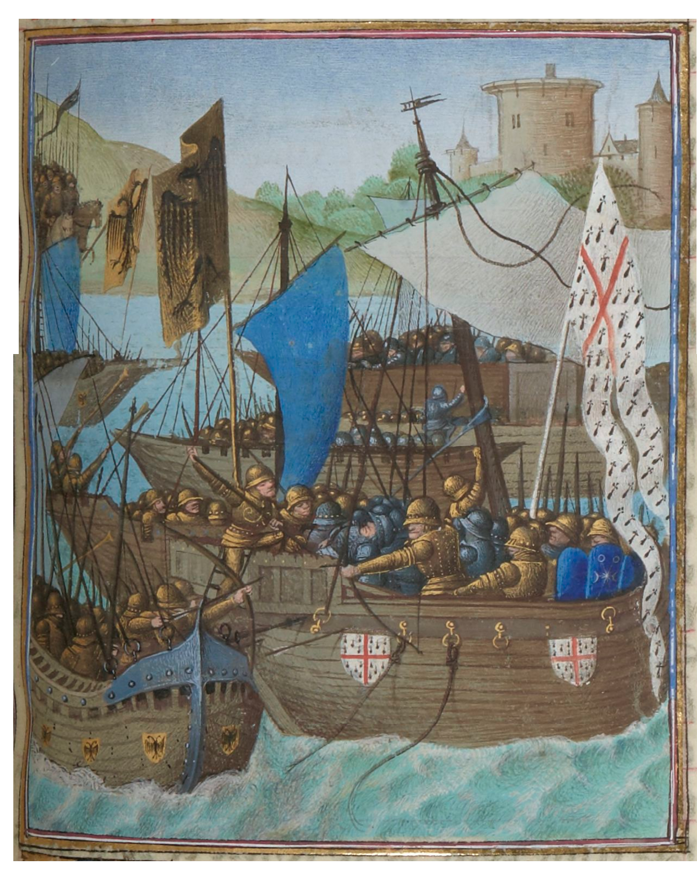 Bataille opposant Les flottes romaines et vénètes